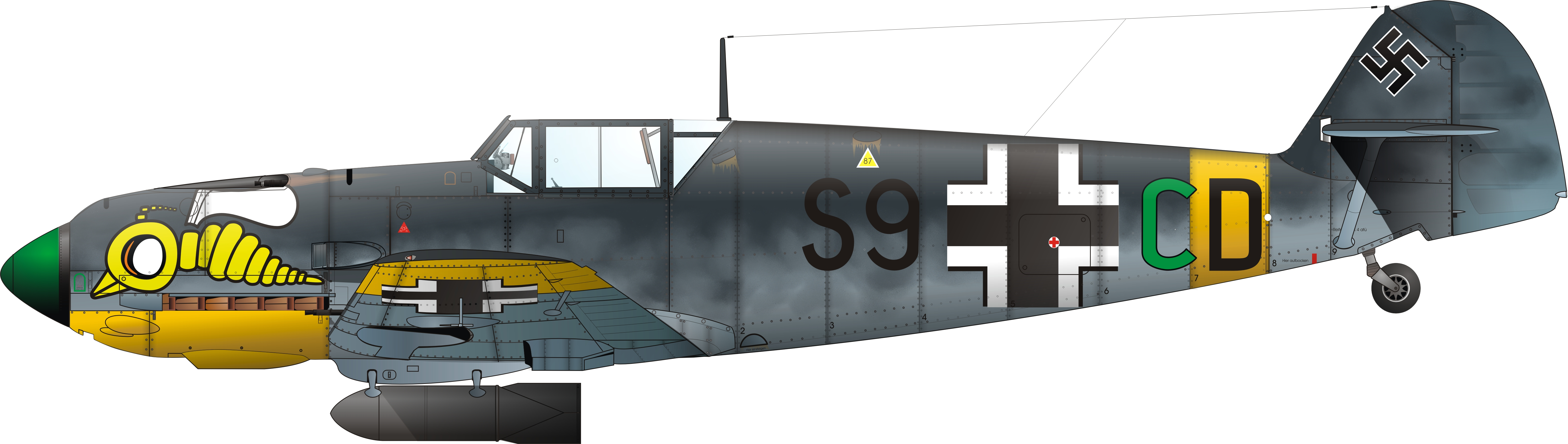 Bf 109 E-7/B, Zerstörergeschwader 1